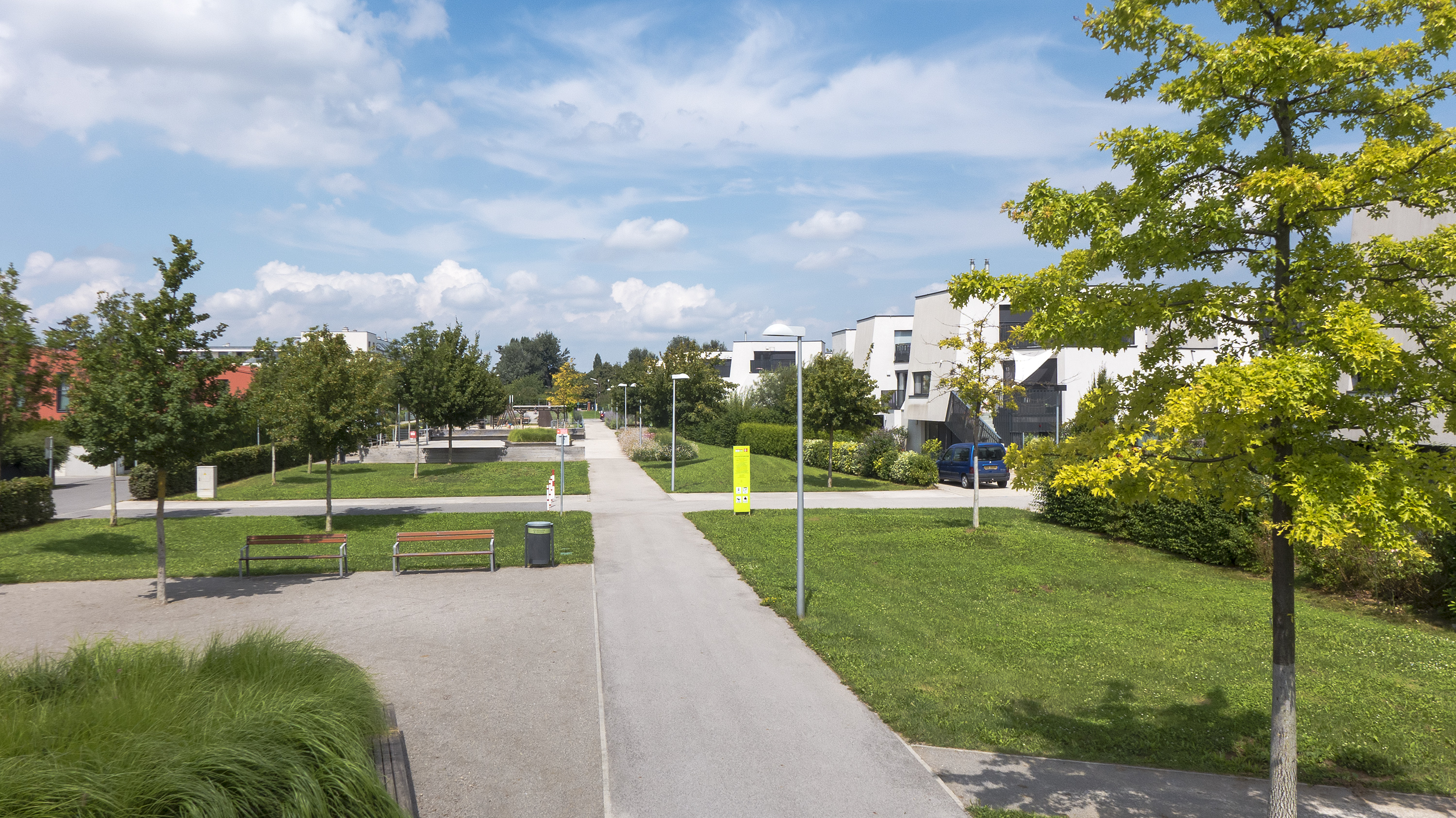 Lumbyepark in Wien 22